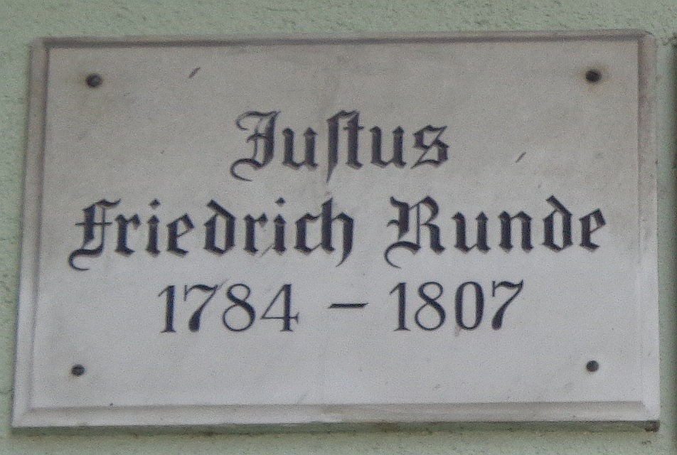 Göttinger Gedenktafel für Justus Friedrich Runde, Jurist (Goethallee 2)